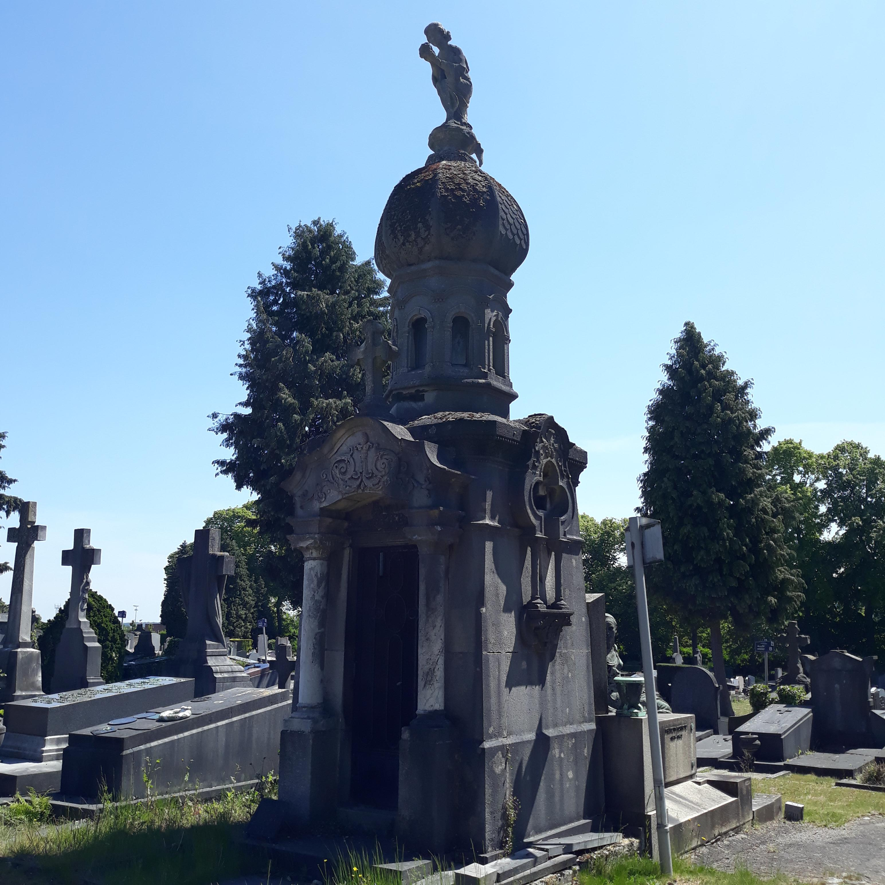 Sépulture éclectique avec une base néo-renaissance et une coiffe orientale.